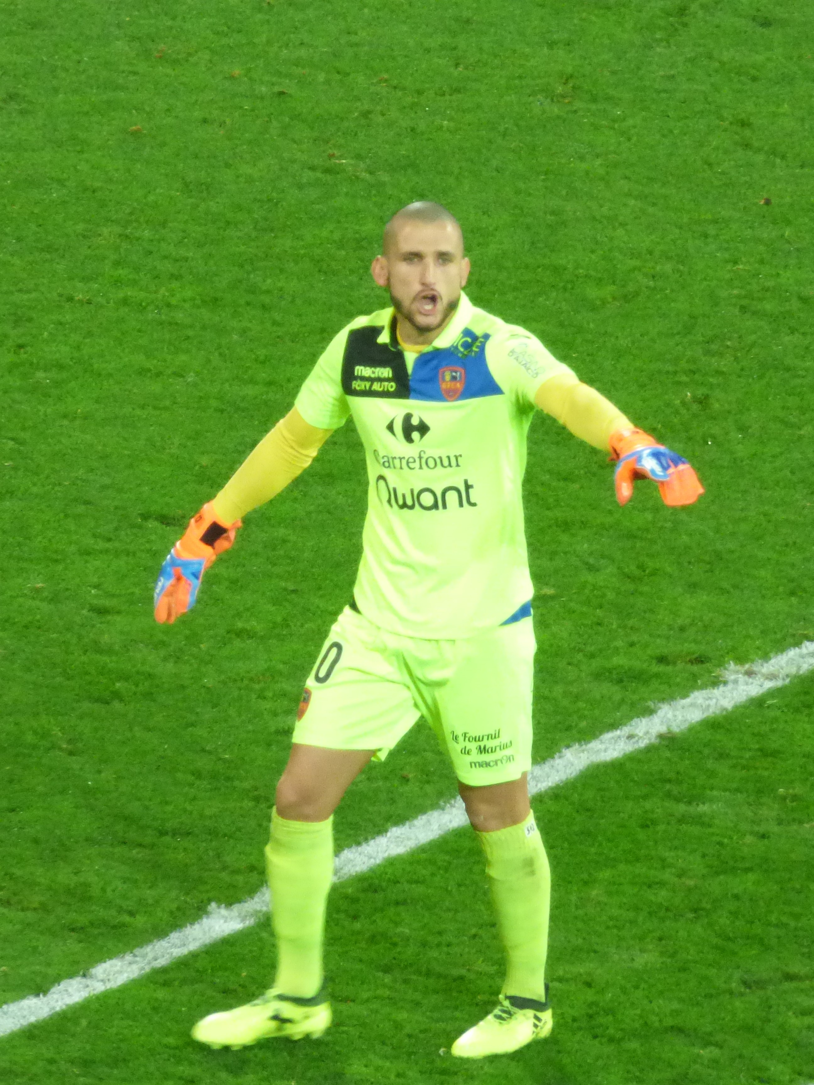 David Oberhauser pendant le match RC Lens / GFC Ajaccio, comptant pour la onzième journée du championnat de France de Ligue 2 2018-2019 au Stade Bollaert-Delelis, le 22 octobre 2018.